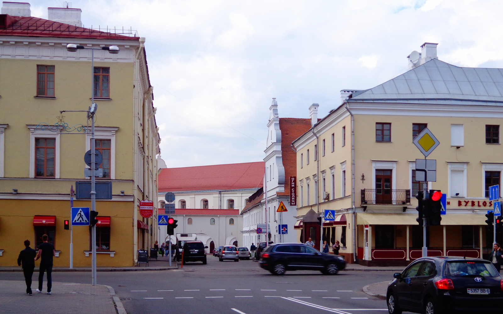 Минск. Верхний город.